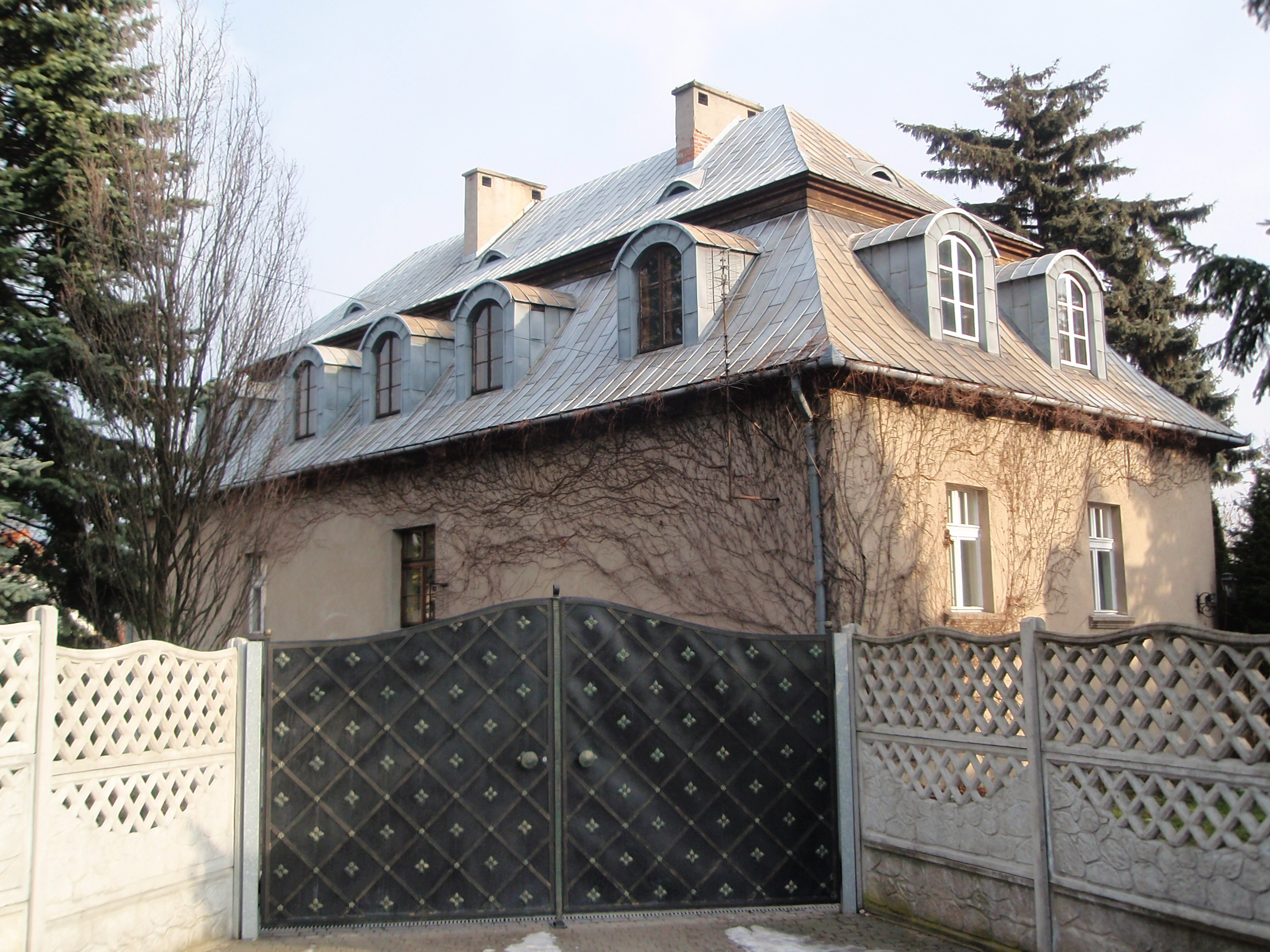 Dawny dwór biskupów krakowskich w Sławkowie (woj. śląskie)